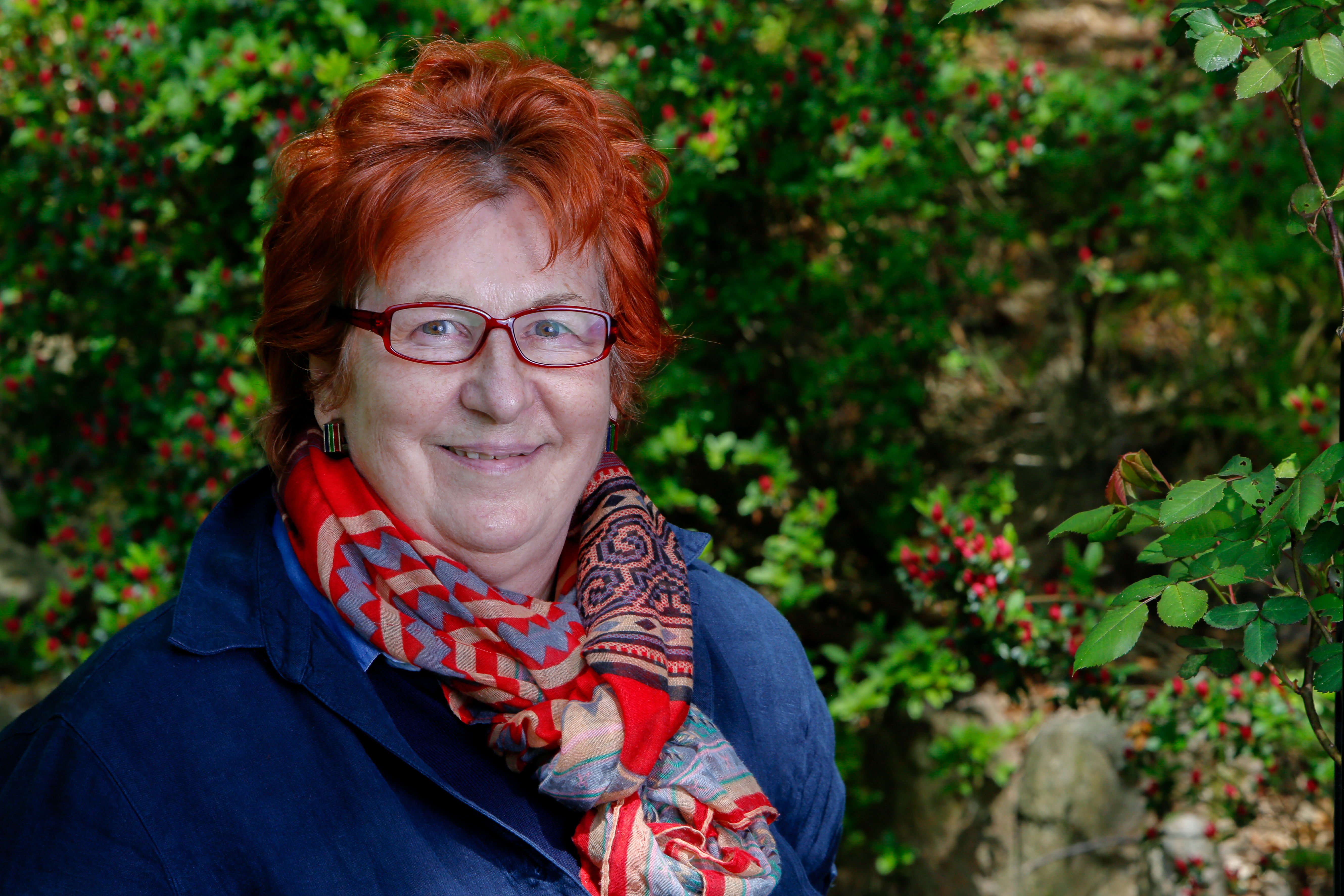 Portrait of Cornelia Bitsch